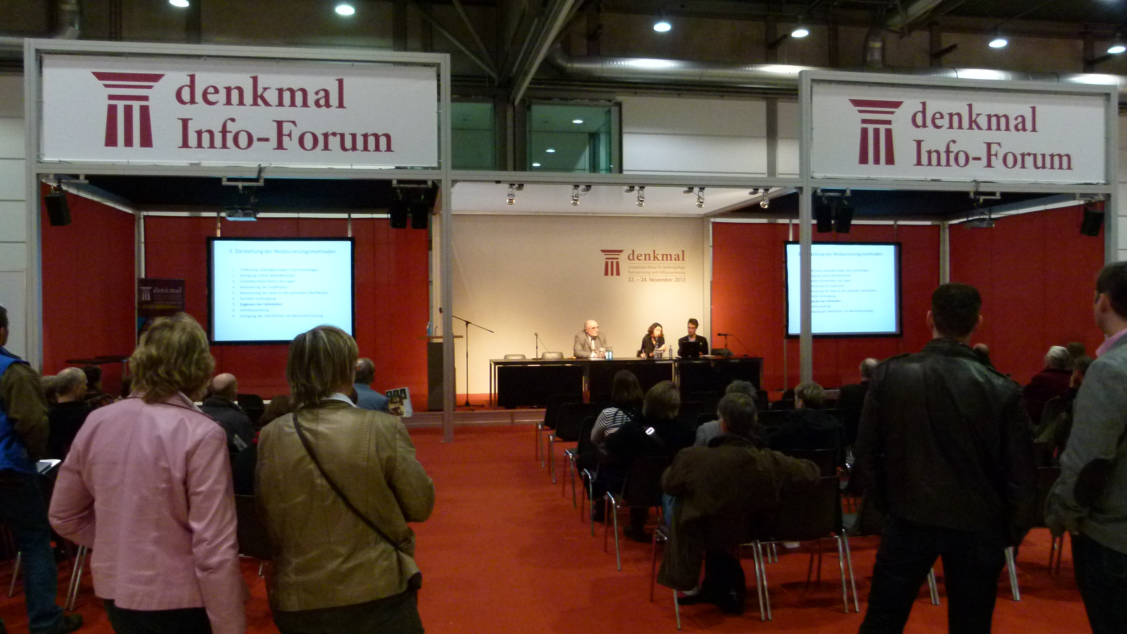 Europäische Denkmal-Messe in Leipzig, 22.-24. November 2012